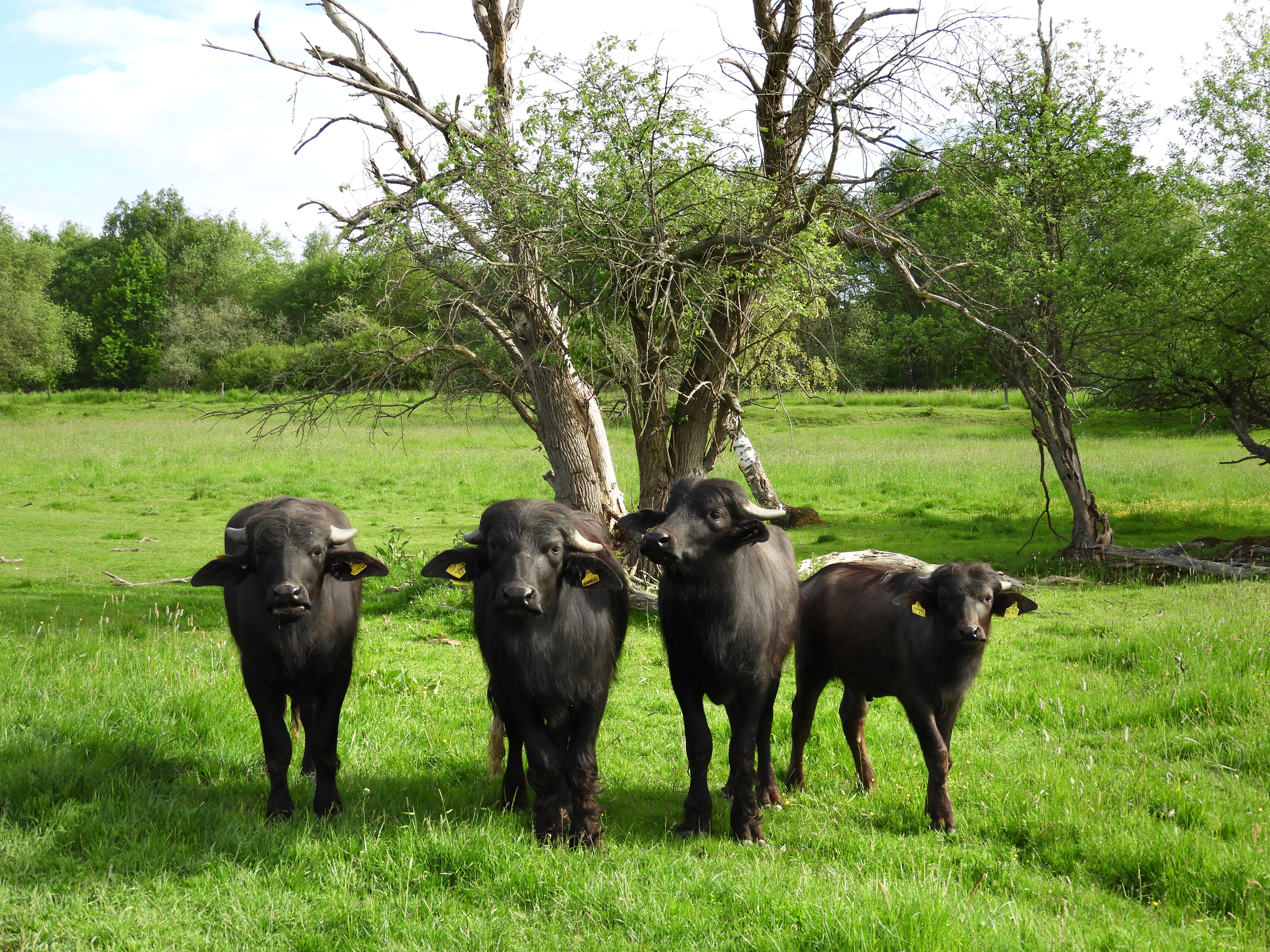 Gruppenbild mit den Landschaftspflegern vom Säulingssee. Das Gebiet hat den Schutzstatus als FFH-Gebiet 5025-302 und ist zugleich seit 1984 als Naturschutzgebiet mit dem CDDA-Code 165337 ausgewiesen. Die extensive Beweidung mit den genügsamen und friedvollen Wasserbüffeln soll die vielfältigen Biotope des Feuchtgebietes wiederherstellen und dauerhaft erhalten. Durch die Abweidung der Hochstaudenfluren und den Verbiss der Gehölze werden die Verbuschung der Aue und die Verschattung und Verlandungsprozesse der Gewässer aufgehalten. Zu Gute kommt die Offenhaltung den seltenen Pflanzengesellschaften, dem Lebensraum der Amphibien und als besserer Brut- und Nahrungsort den zahlreichen Vogelarten.